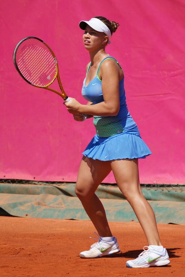 Valeria SAVINYKH, Open tennis, Cagnes-sur-Mer 2011